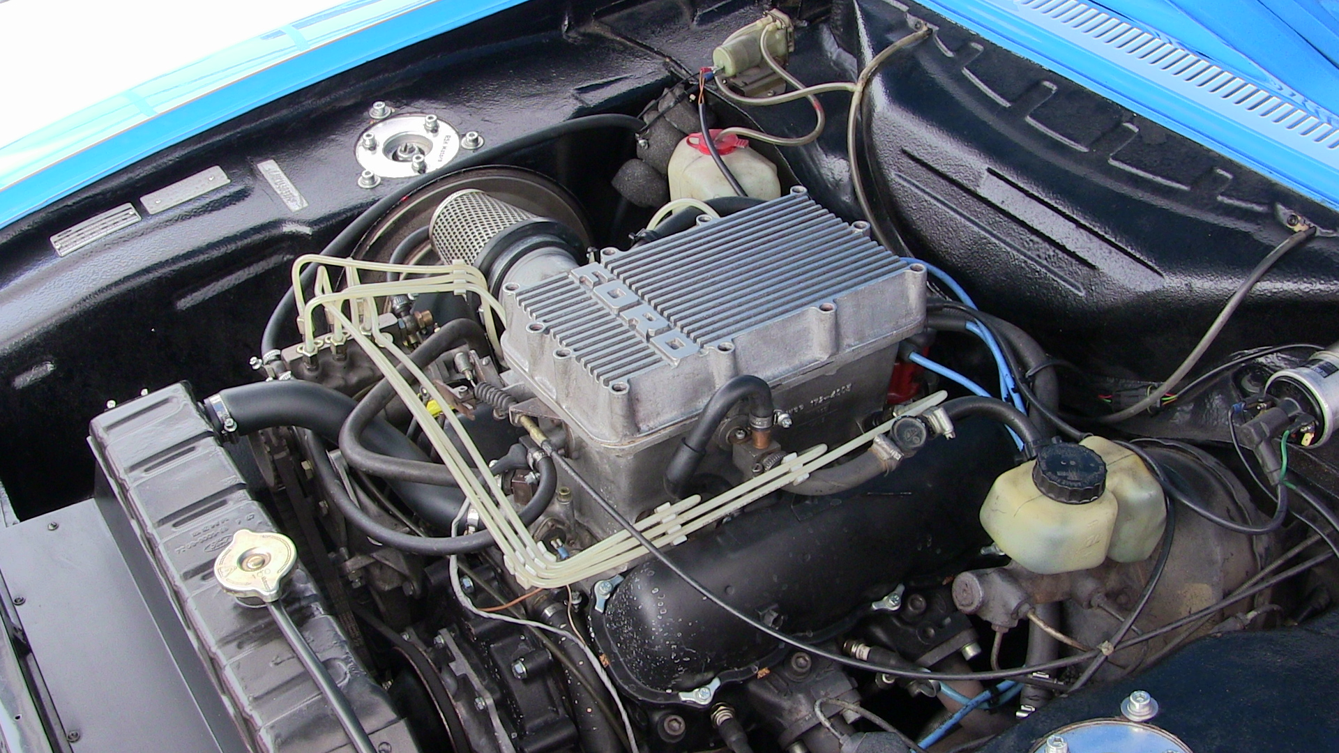 Ford Capri RS 2600 original Motor 1971